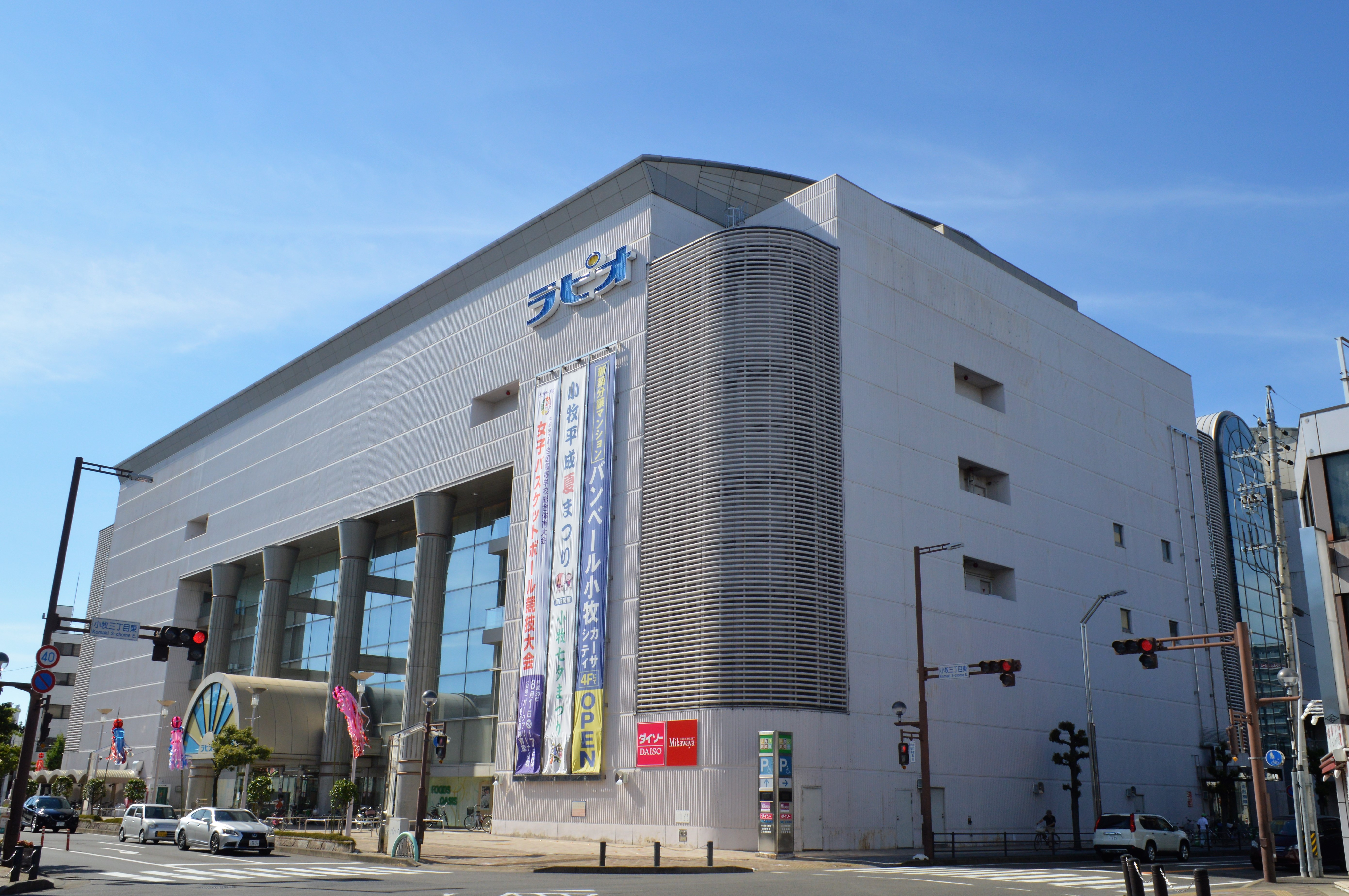 愛知県小牧市の複合商業施設「ラピオ」。